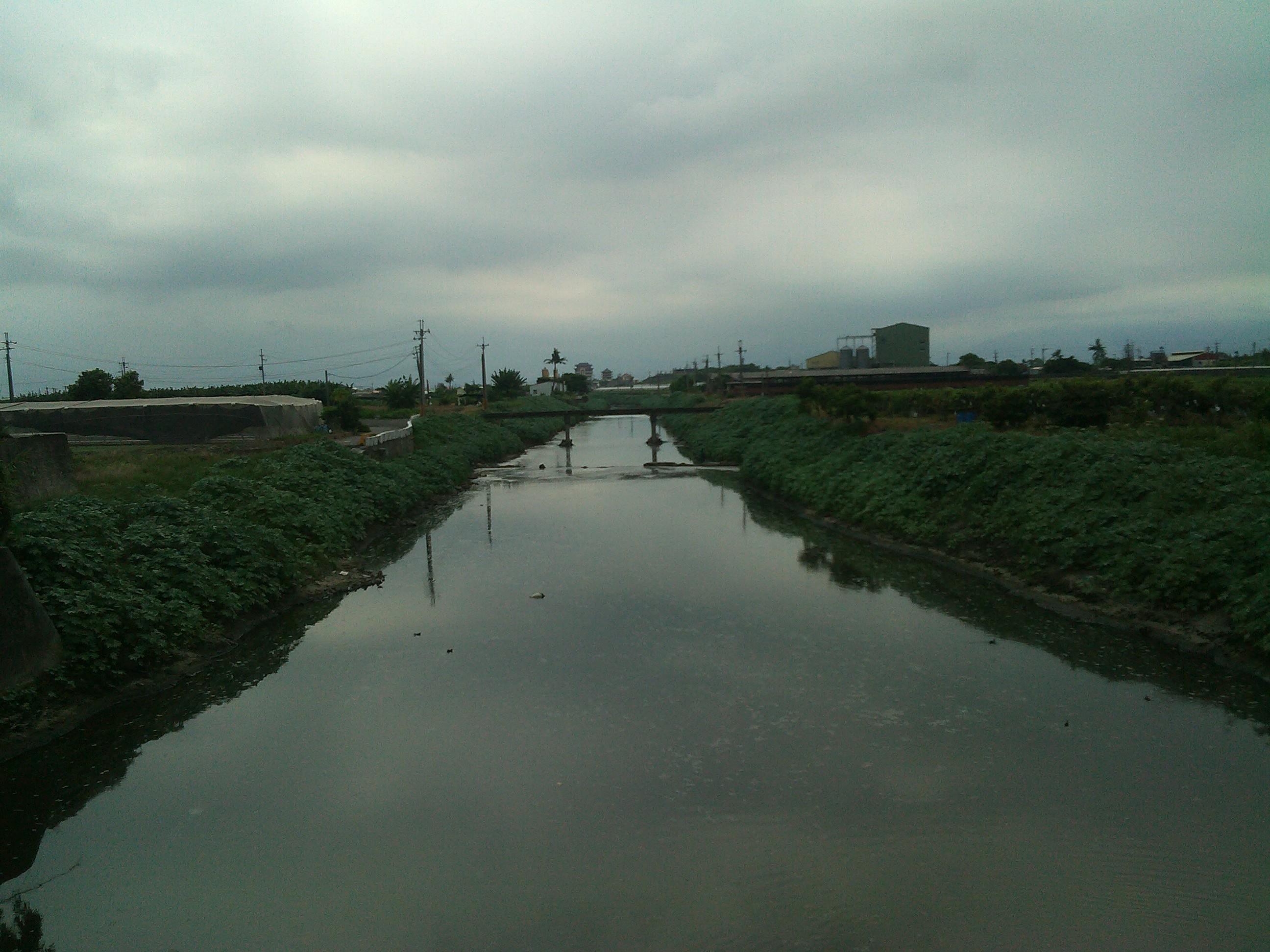 發源於屏東市玉成里 由北往南流經萬丹鄉中部 於萬丹及新園兩鄉一帶匯入高屏溪